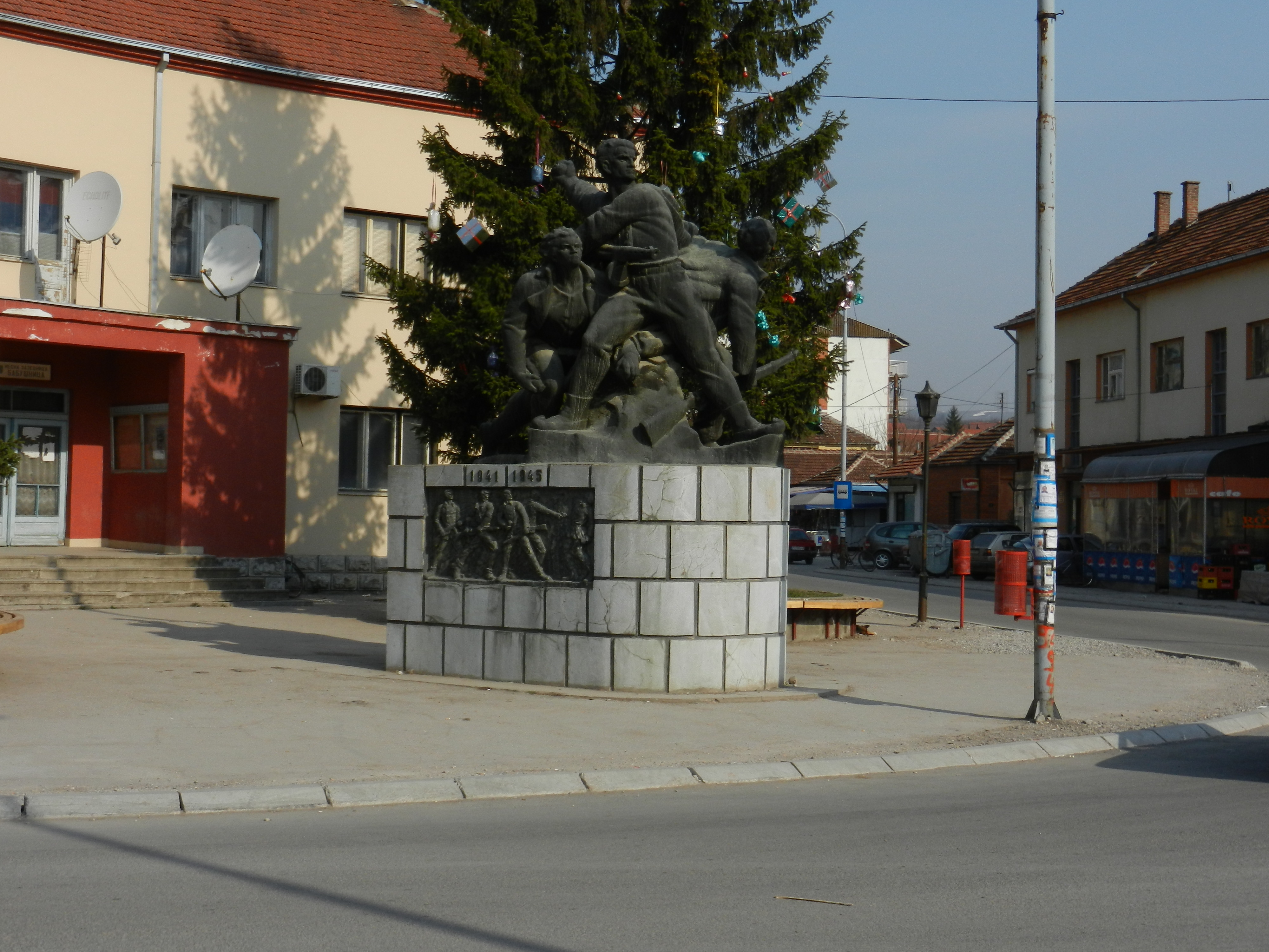 Споменик у центру Бабушнице. Ја (MstudiodfMstudiodf (разговор)) сам аутор овог дела.